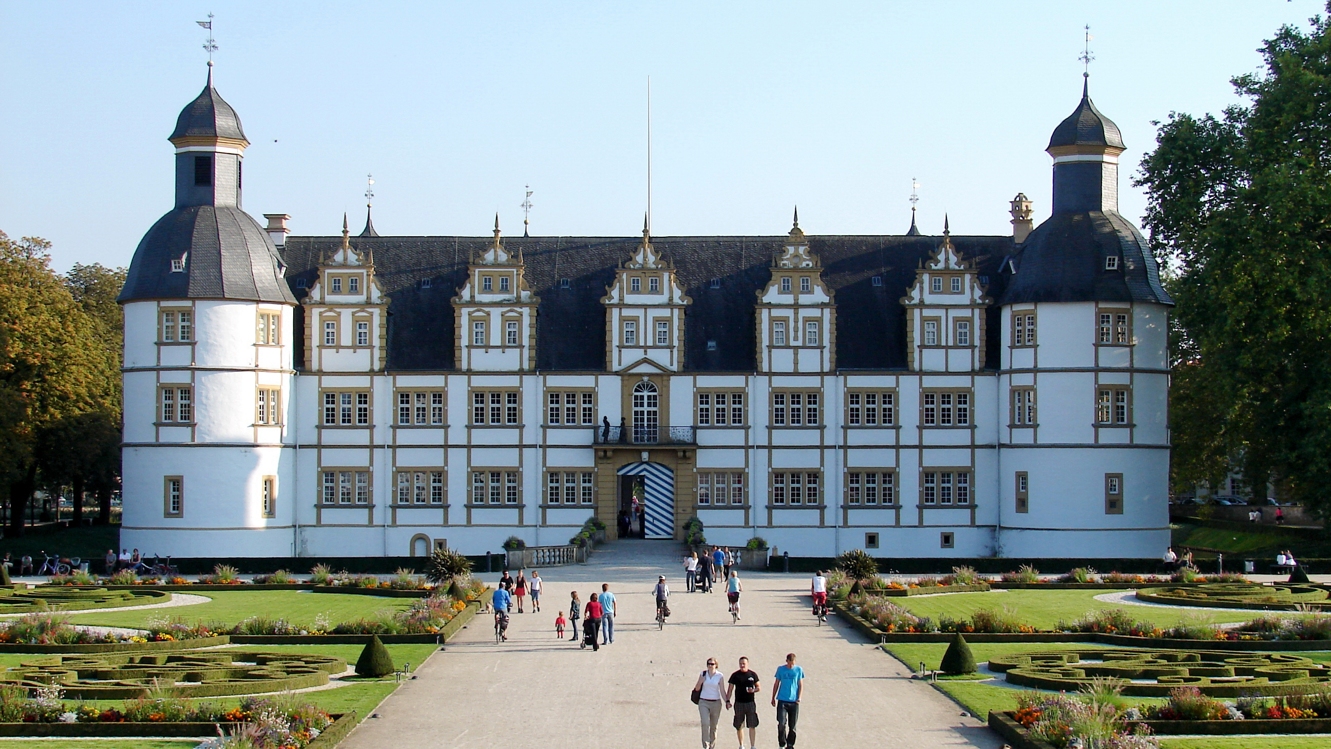 Das Schloss Neuhaus im nach ihm benannten Paderborner Stadtteil Schloß Neuhaus ist ein bedeutendes Bauwerk der Weserrenaissance. Es liegt in inselähnlicher Lage am Zusammenfluss von Lippe, Alme und Pader im Südostwinkel der Westfälischen Bucht.